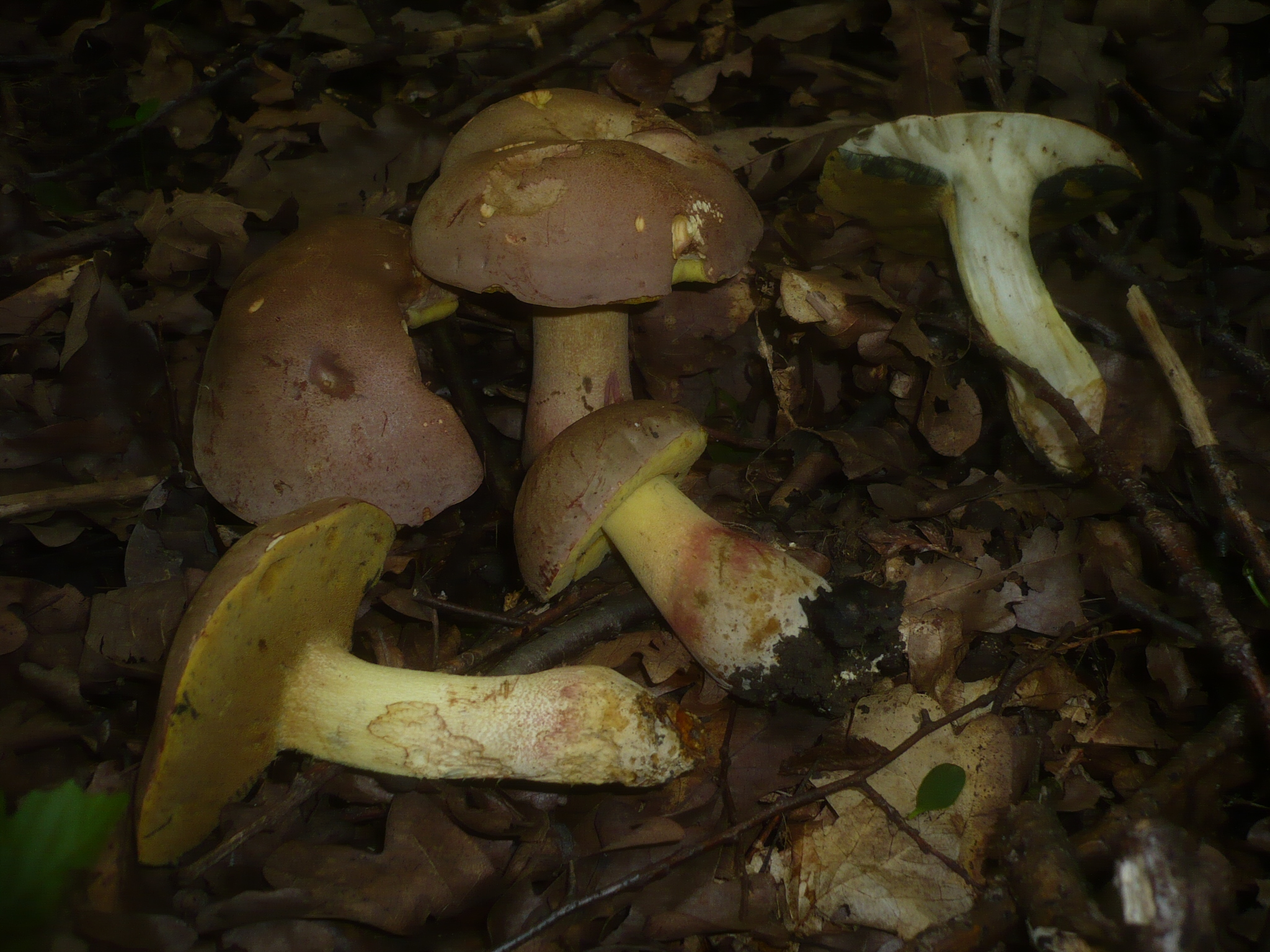 Boletus fechtneri Velenovsky